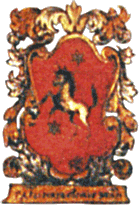 Герб Северной страны из жаловонной грамоты Екатерины I.